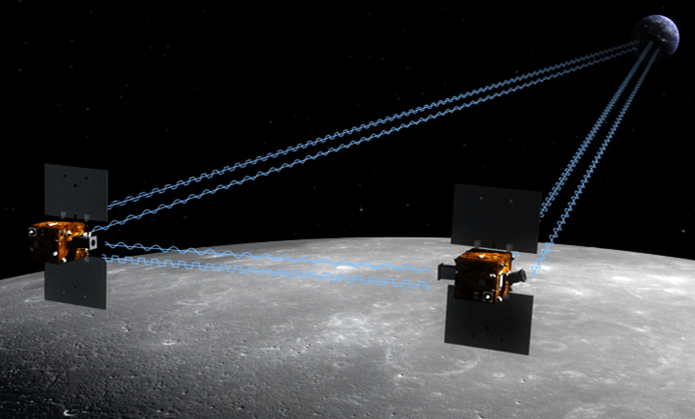 GRAIL lunar probes